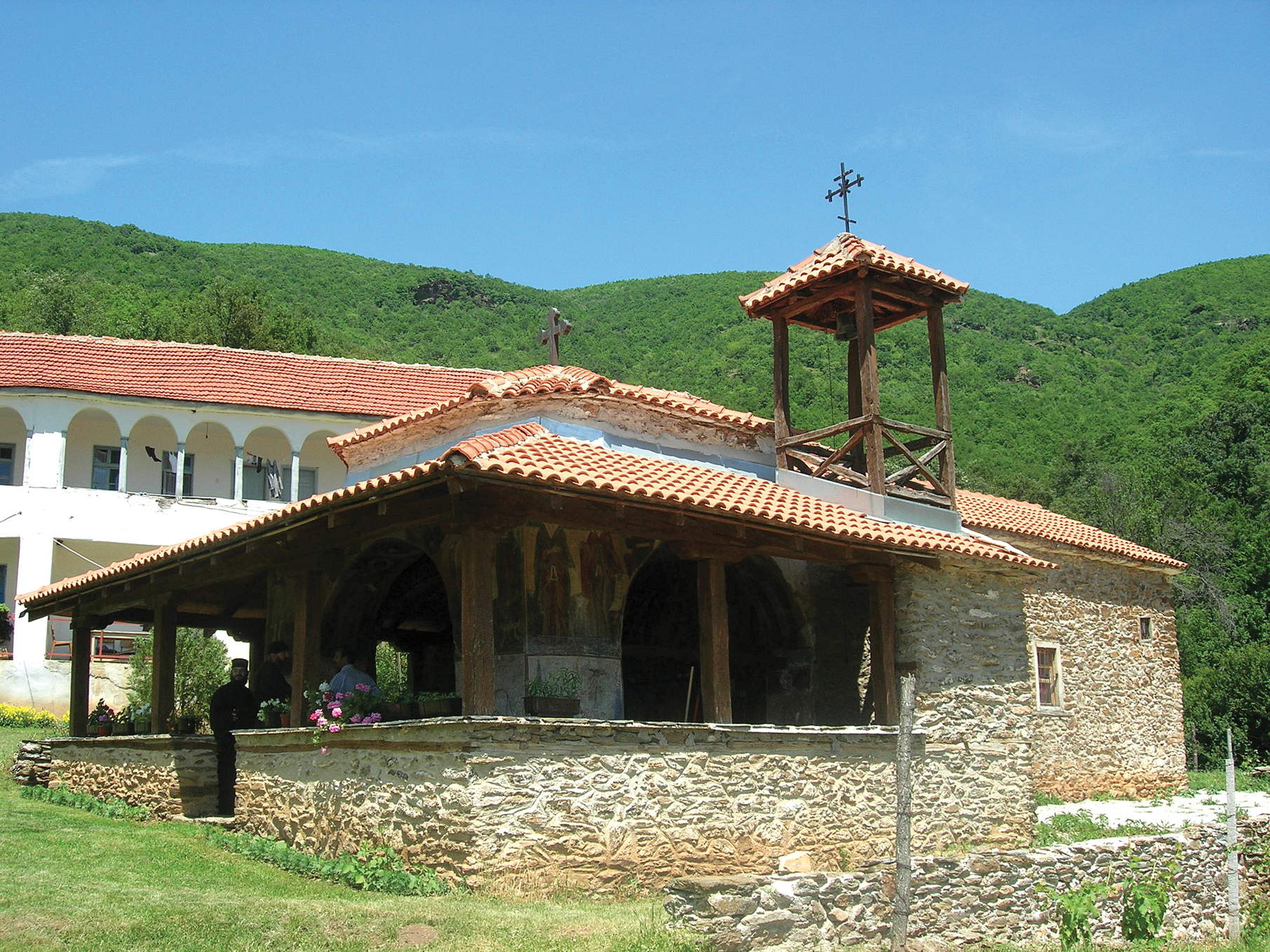 монастырь Журче